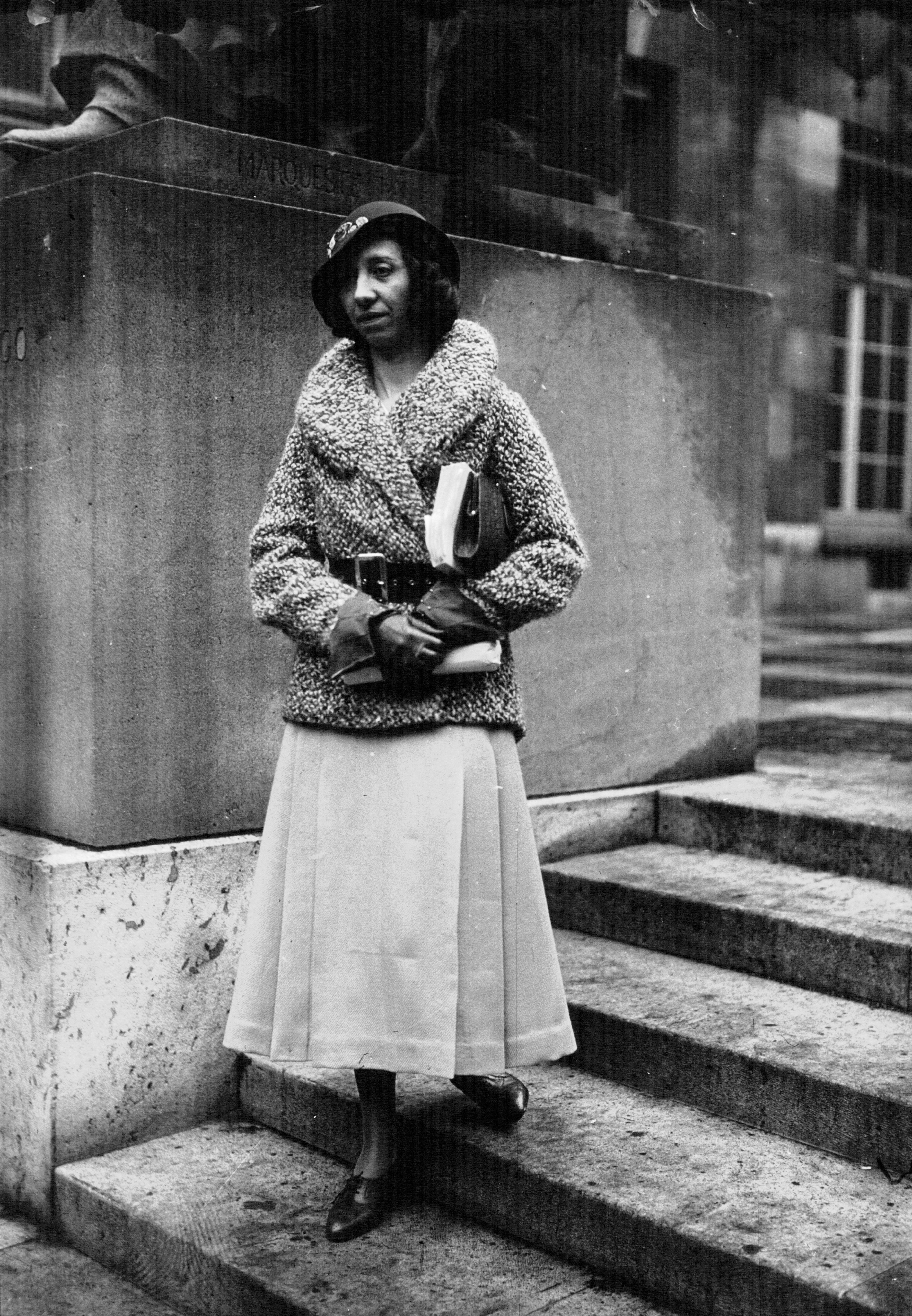 Portrait de Suzanne